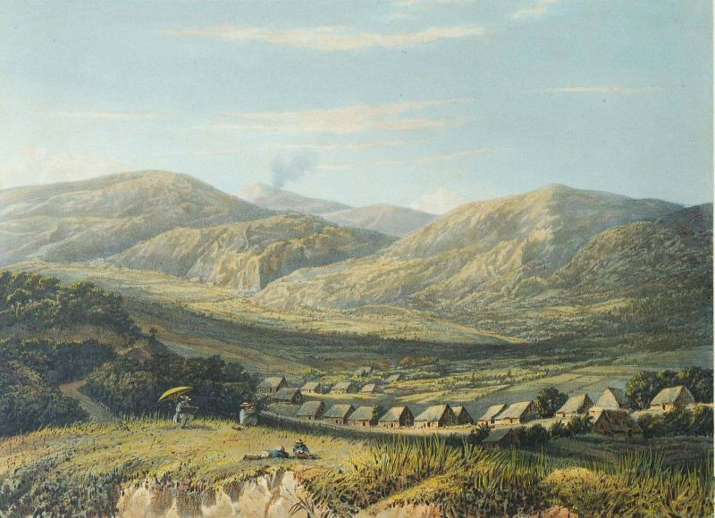 Litho. Litho naar een oorspronkelijk schilderij van A. Salm. Op de voorgrond links is vermoedelijk de schilder Salm afgebeeld, die onder een parasol aan het tekenen is.. Berglandschap in de Tengger